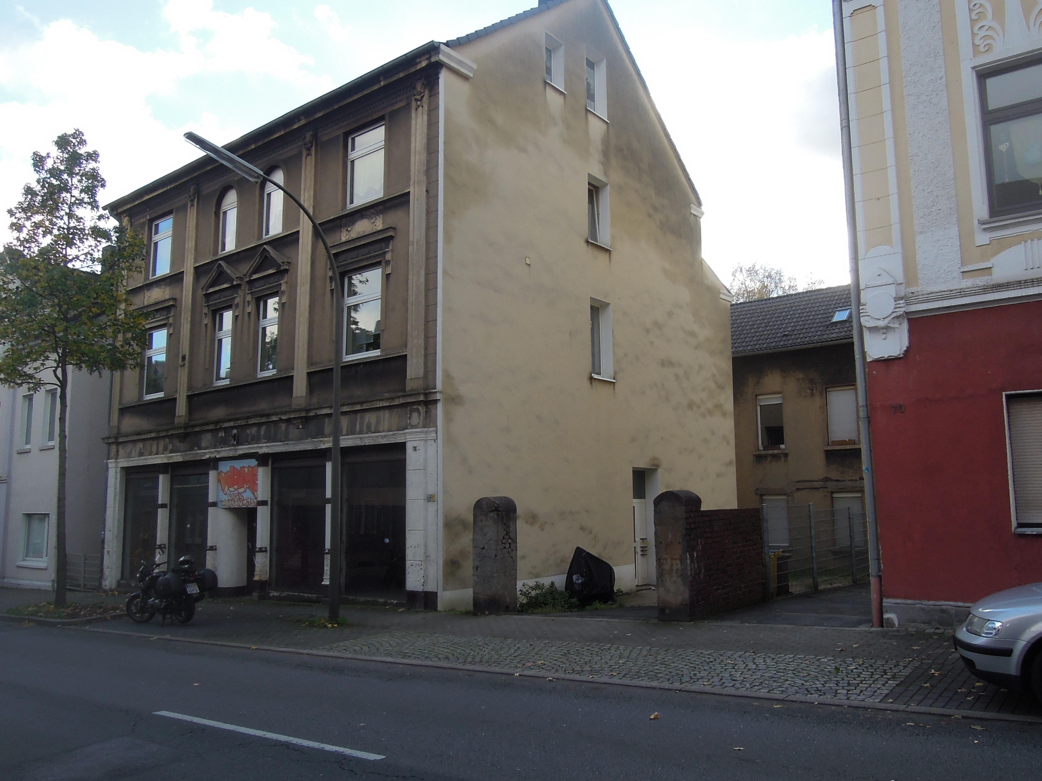 Lage des Stolpersteins Dortmund Lütgendortmunder Straße 68 Willy Rothschild